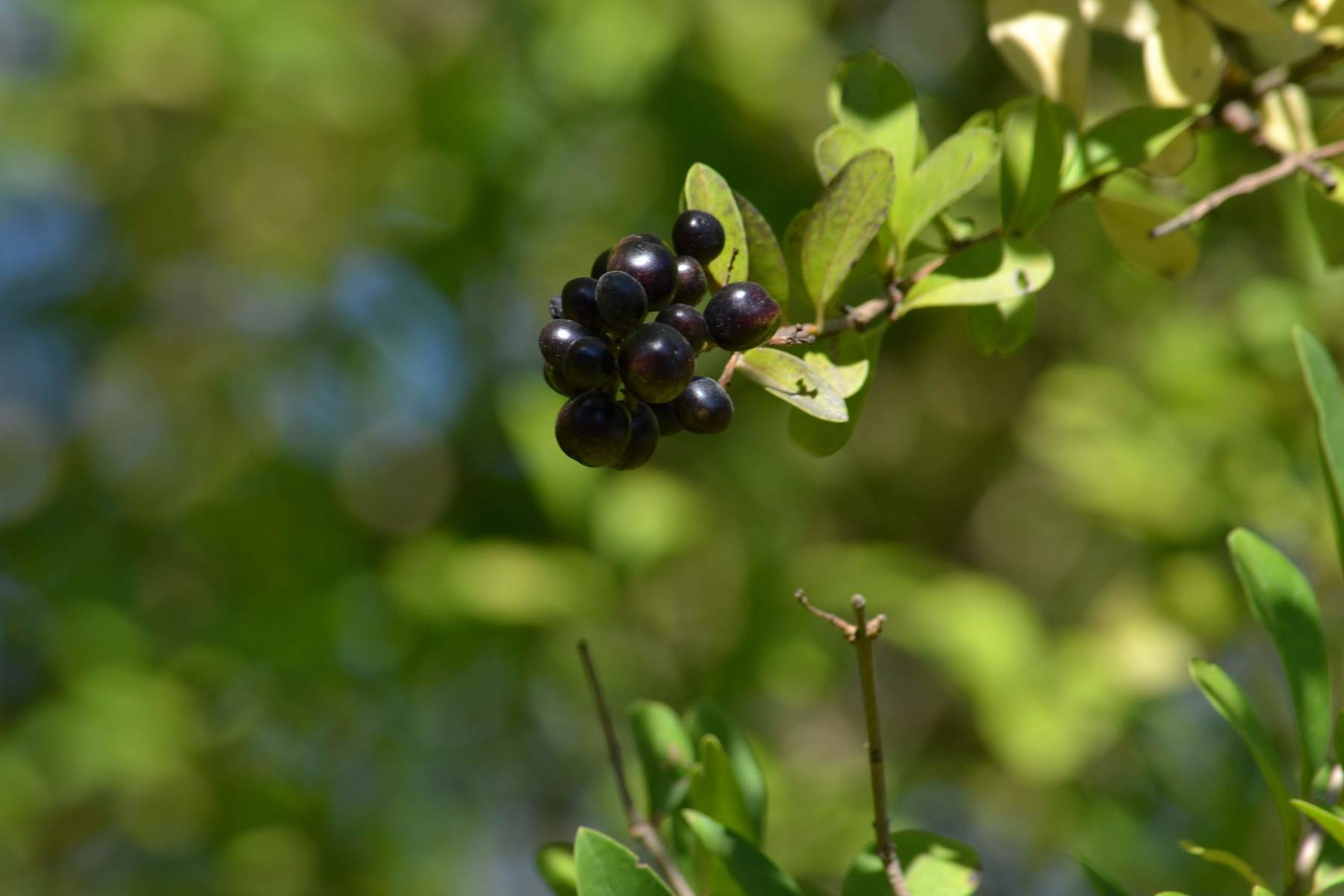 Ligustr pospolity